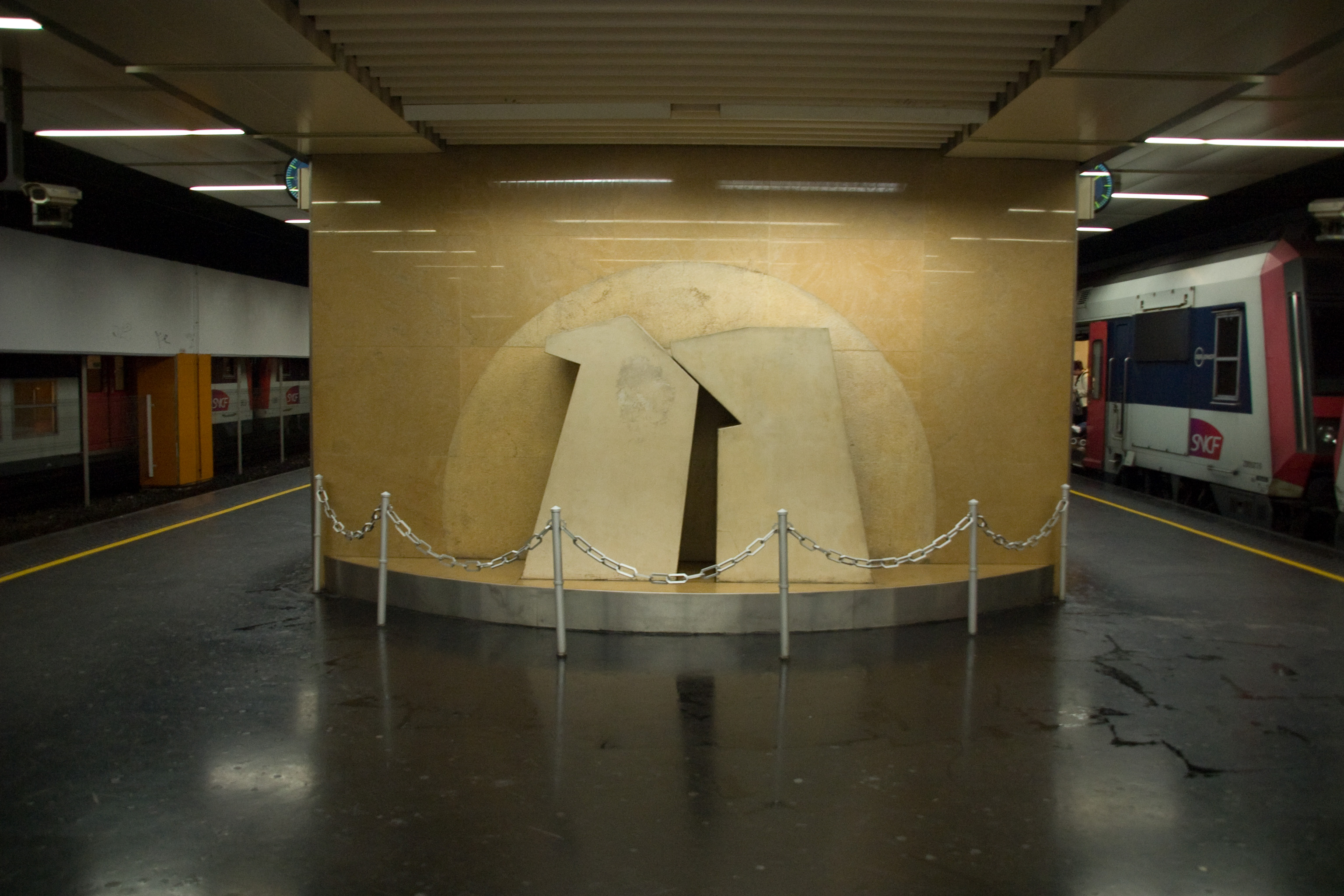 Gare souterraine de la Gare de Lyon (Paris, France). Monument érigé sur le lieu de l'accident ferroviaire de 1988 en mémoire des 56 victimes.